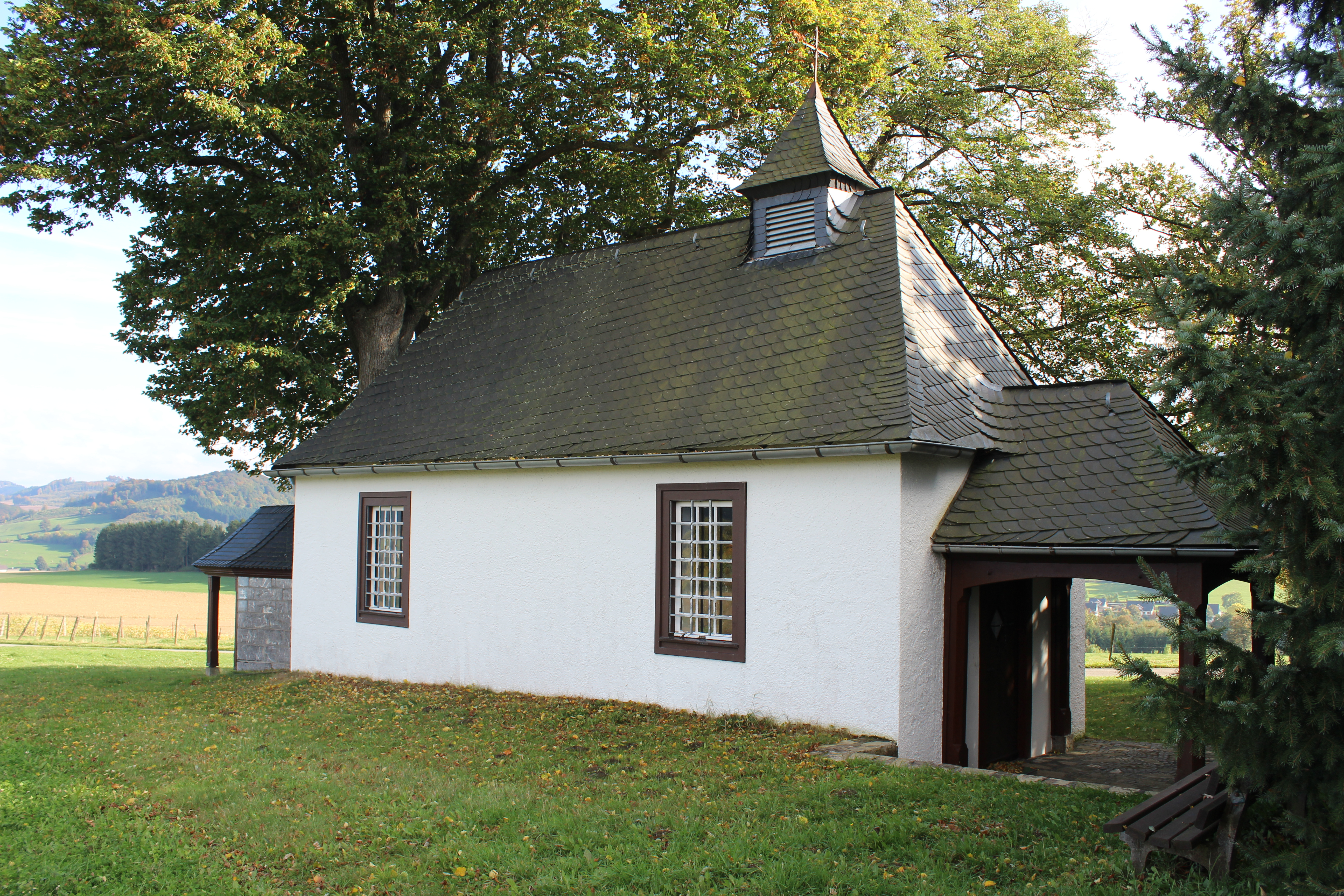 Blick aus Richtung Nordwest auf die Hallohkapelle